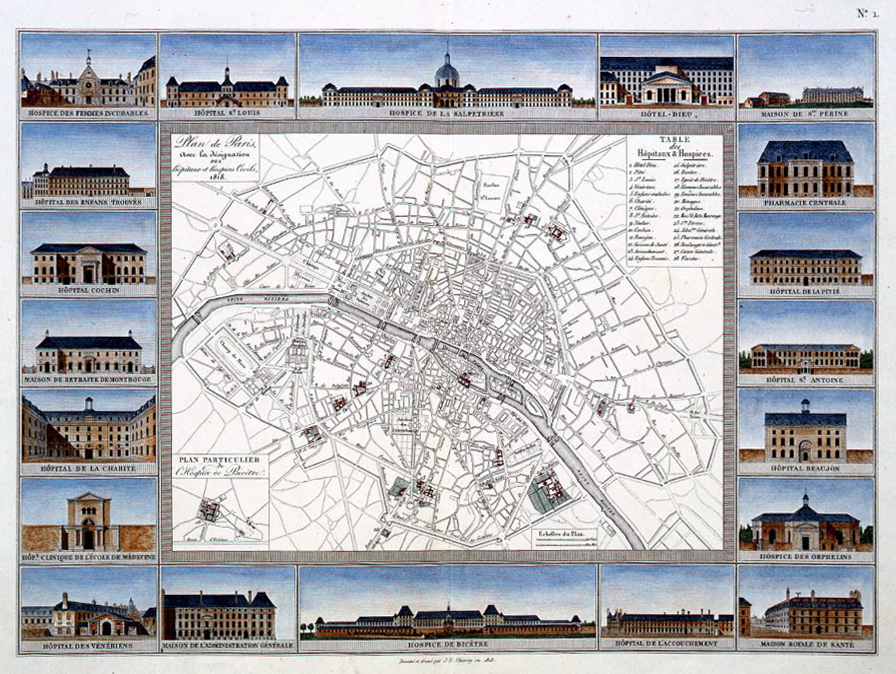 Carte hospitalière de Paris en 1820 établie d'après le plan des hôpitaux et hospices civils de la ville de Paris. - Avec des représentations de l'Hospice de la Salpêtrière, l'[ancien] Hôtel Dieu, la Maison de Sainte-Périne, la Pharmacie Centrale, l'Hôpital Saint-Antoine, l'Hôpital Beaujon, l'Hospice des Orphelins, la Maison Royale de Santé, l'Hôpital de l'Accouchement, l'Hospice de Bicêtre, la Maison de l'Administration Générale, l'Hôpital des Vénériens, l'Hôpital Clinique de l'Ecole de Médecine, l'Hôpital de la Charité, la Maison de Retraite de Montrouge, l'Hôpital Cochin, l'Hôpital des Enfants Trouvés, l'Hospice des Femmes incurables et de l'Hôpital Saint-Louis.